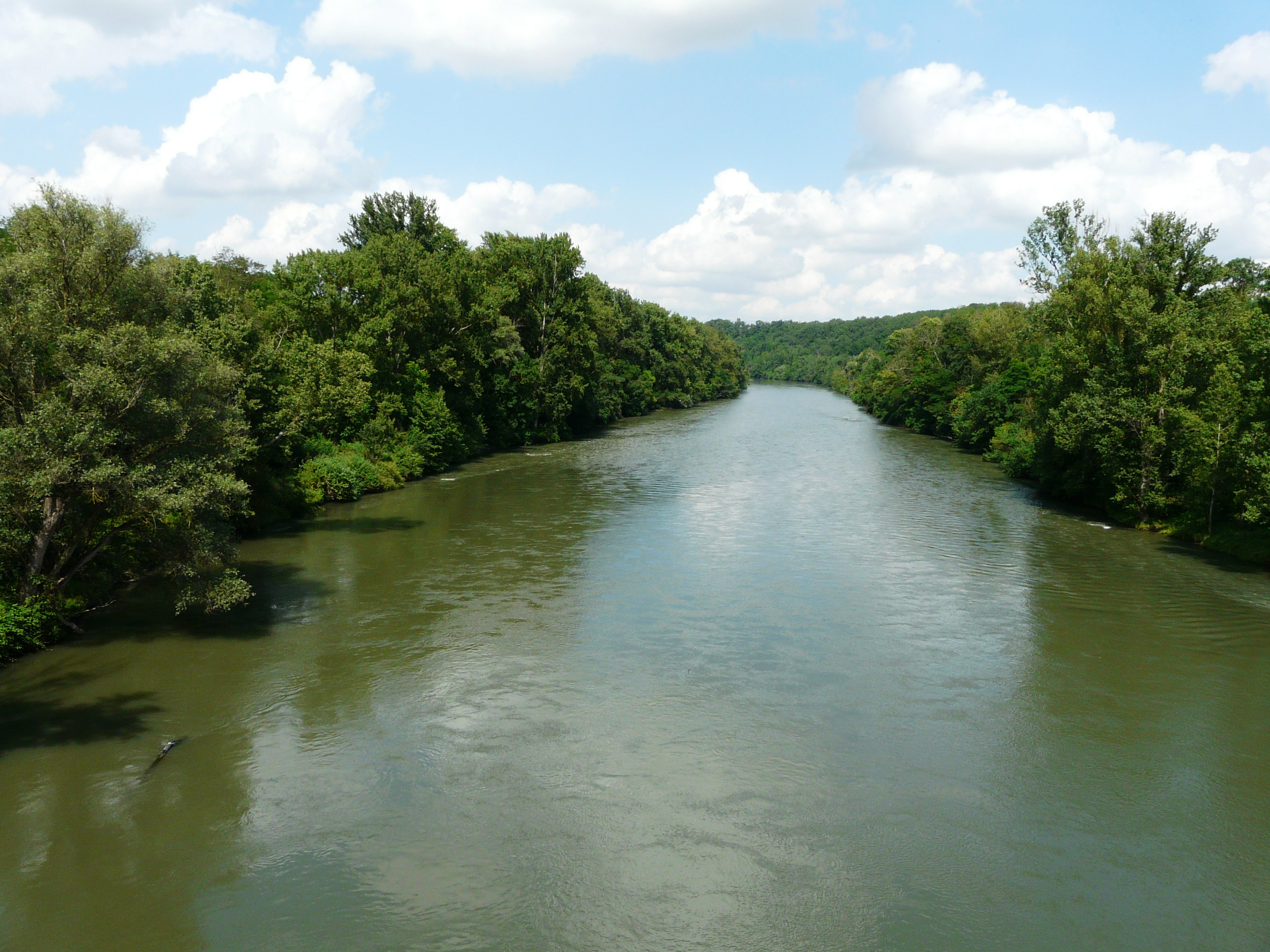 En aval du pont de la route départementale 25, la Garonne marque la limite entre les communes de Saint-Julien-sur-Garonne (à gauche) et Rieux-Volvestre (à droite), Haute-Garonne, France.